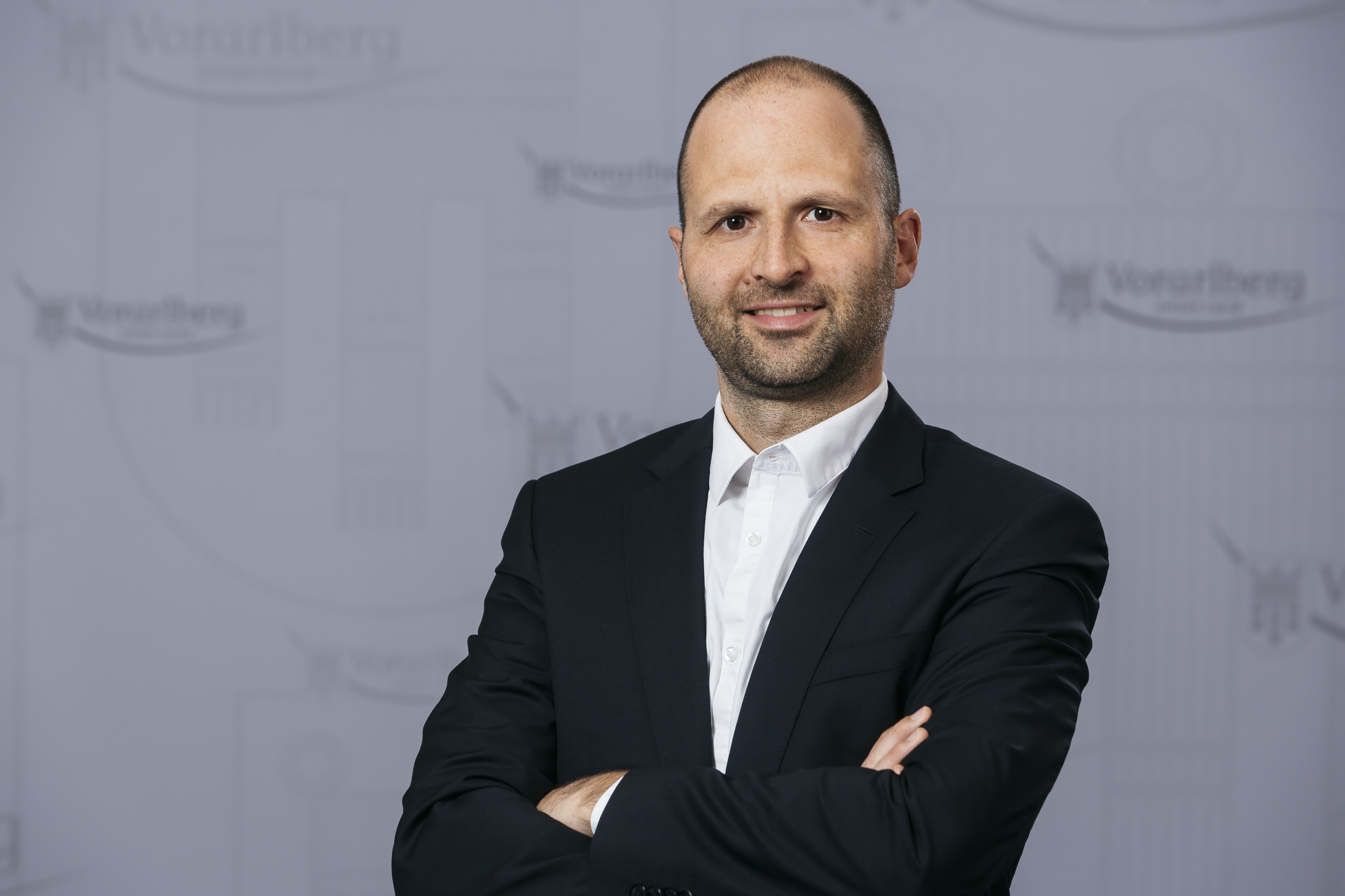 Marco Tittler ist Landesrat und Mitglieder der Landesregierung Vorarlberg